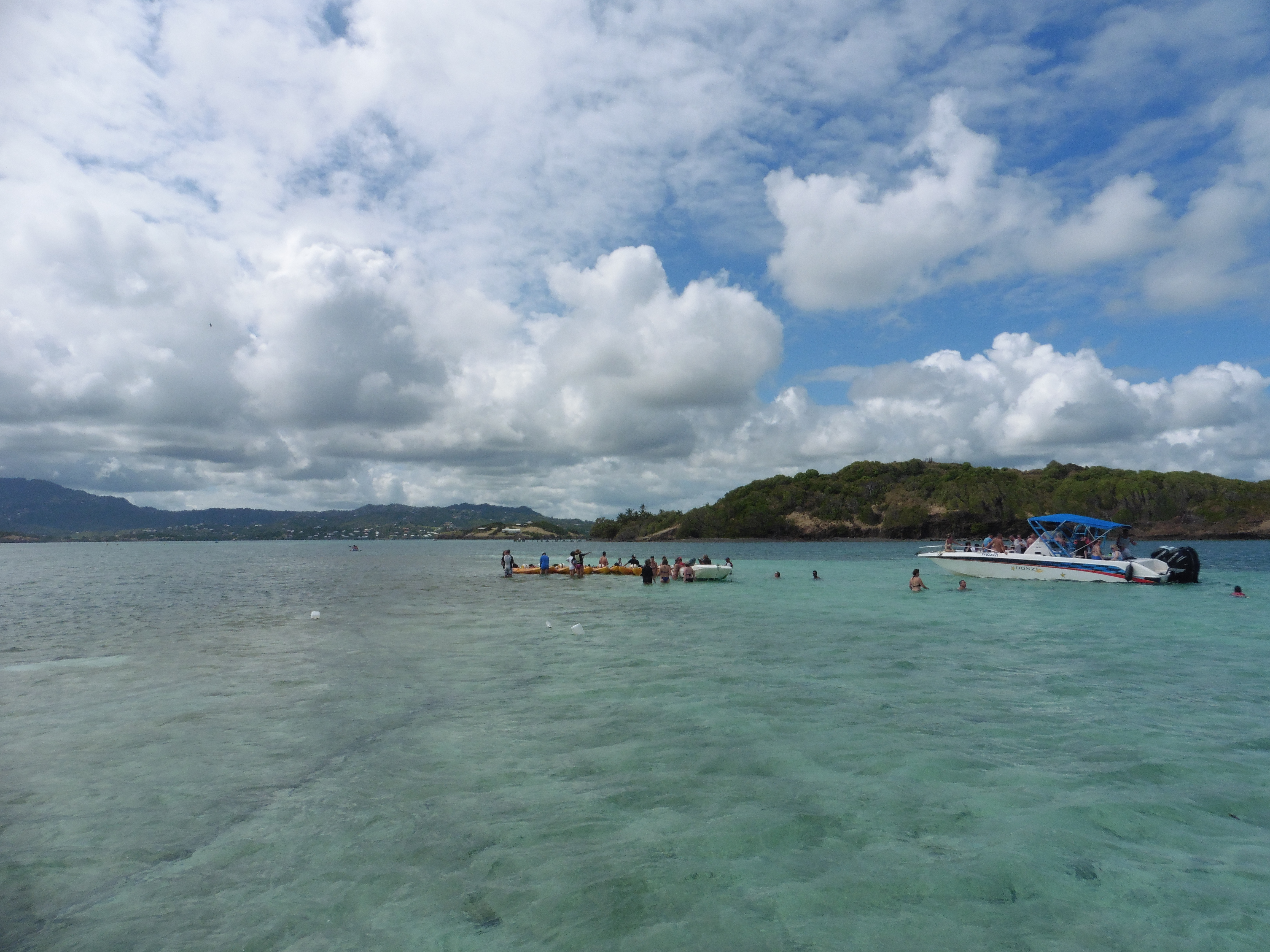 Haut-fond de la baie du François dit Baignoire de Joséphine